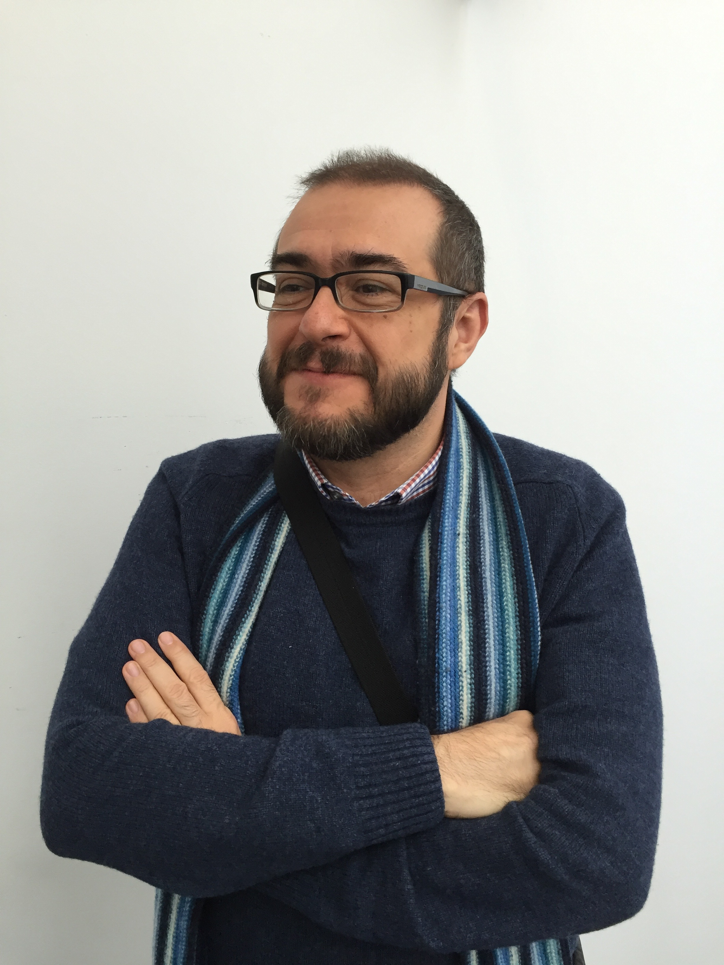 Museu Valencià de la Il·lustració i de la Modernitat gener 2016